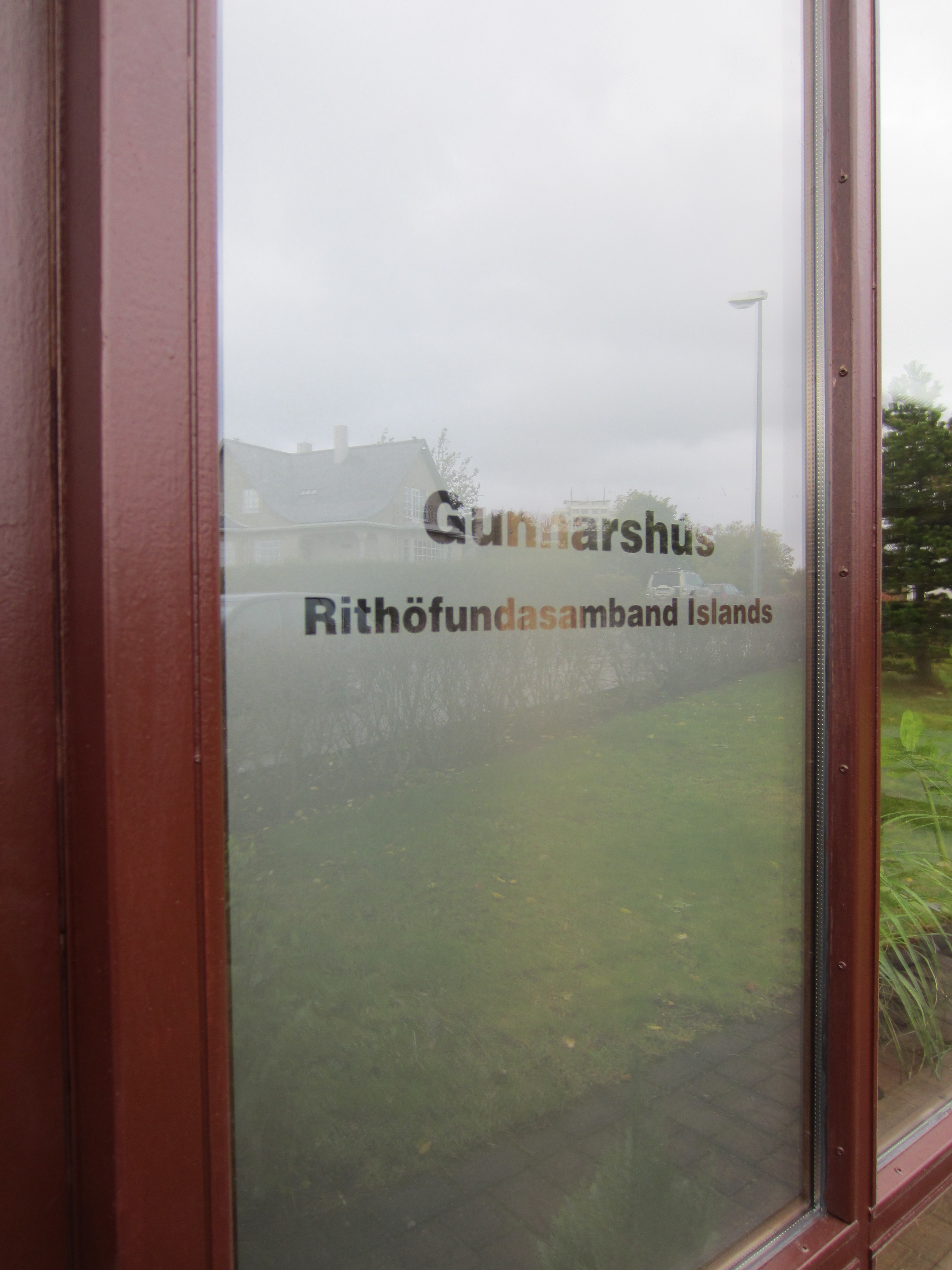 door to writers union of Iceland